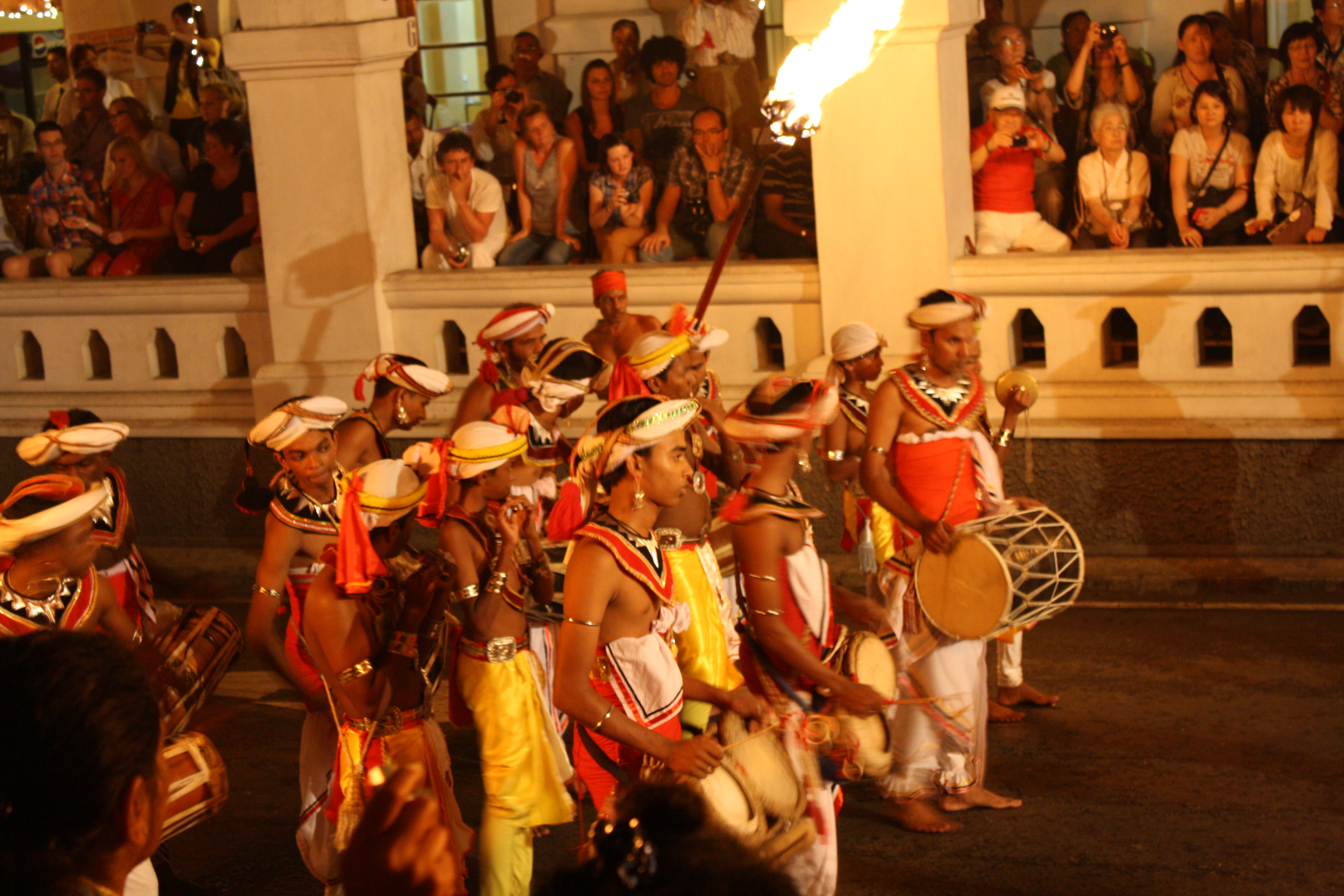 pere hare festival